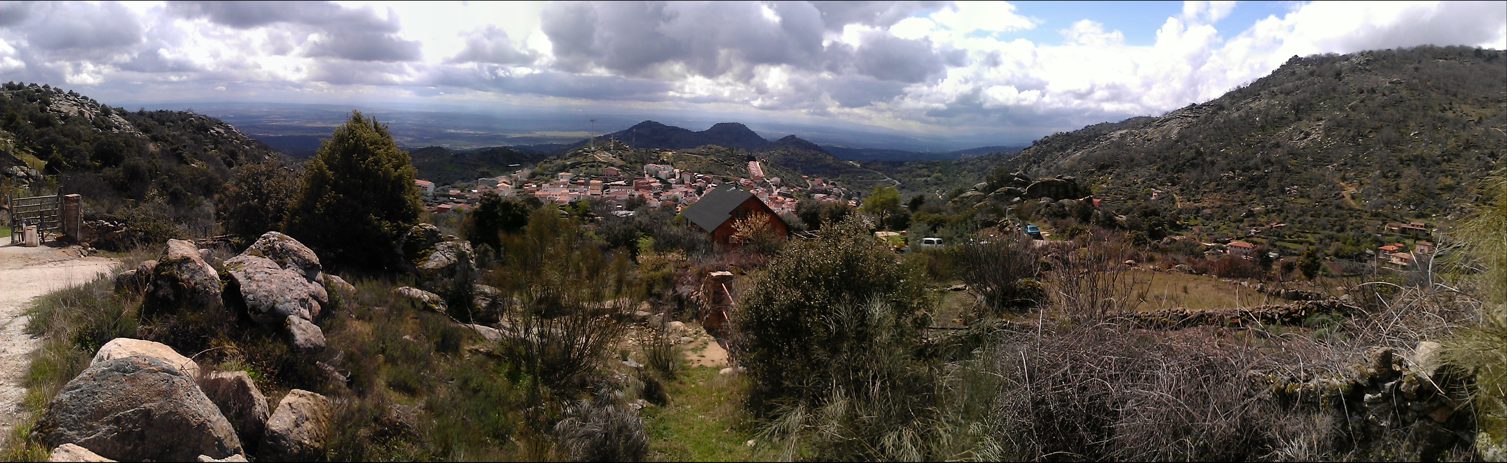 El Real de San Vicente, Toledo (España)